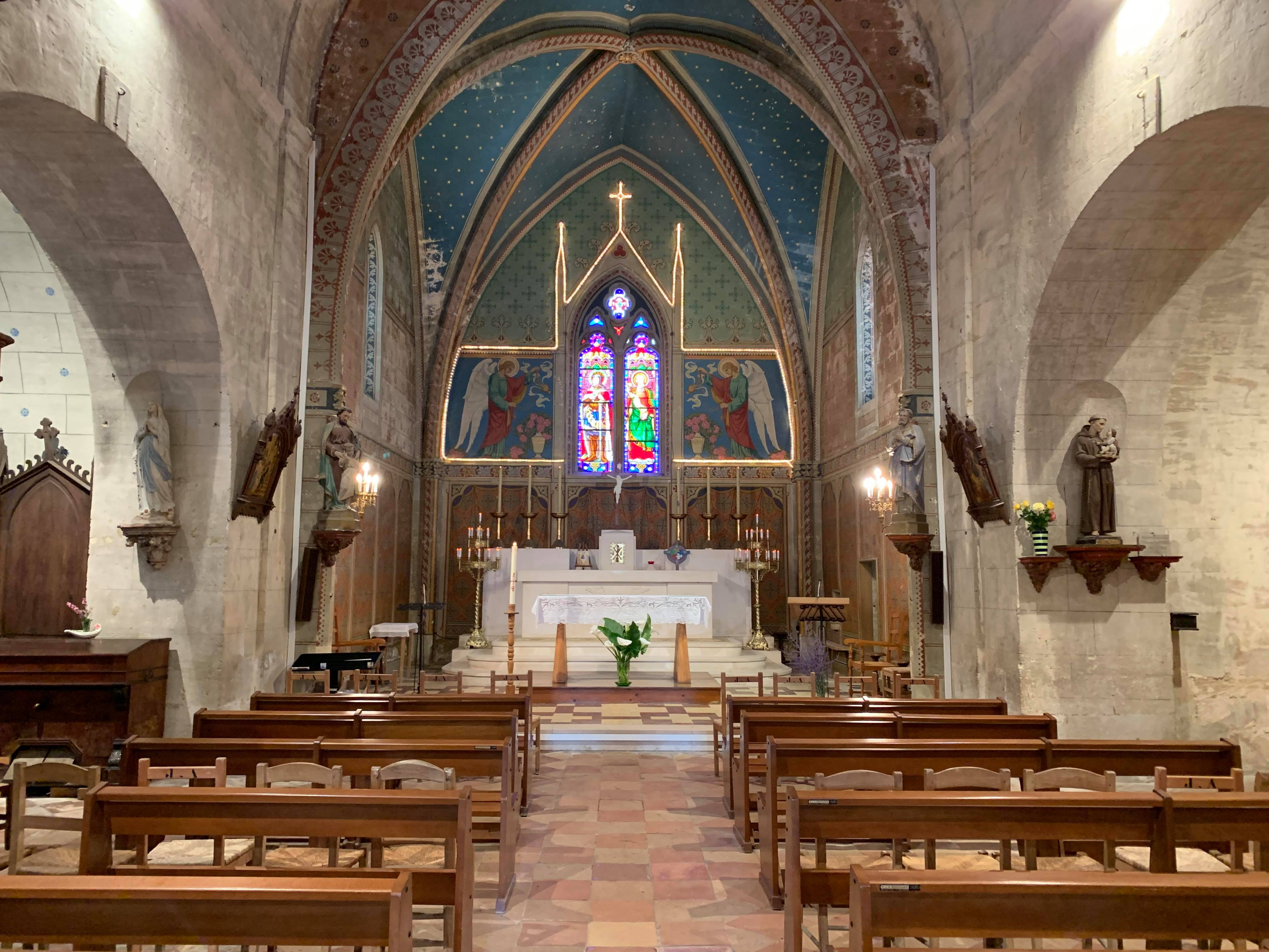 Au centre, le chœur. A gauche, la statue de la Vierge Marie et à droite, celle de Saint Antoine de Padoue. L'église était fleurie et les lumières allumées, ce qui permet de la voir sous un autre angle.